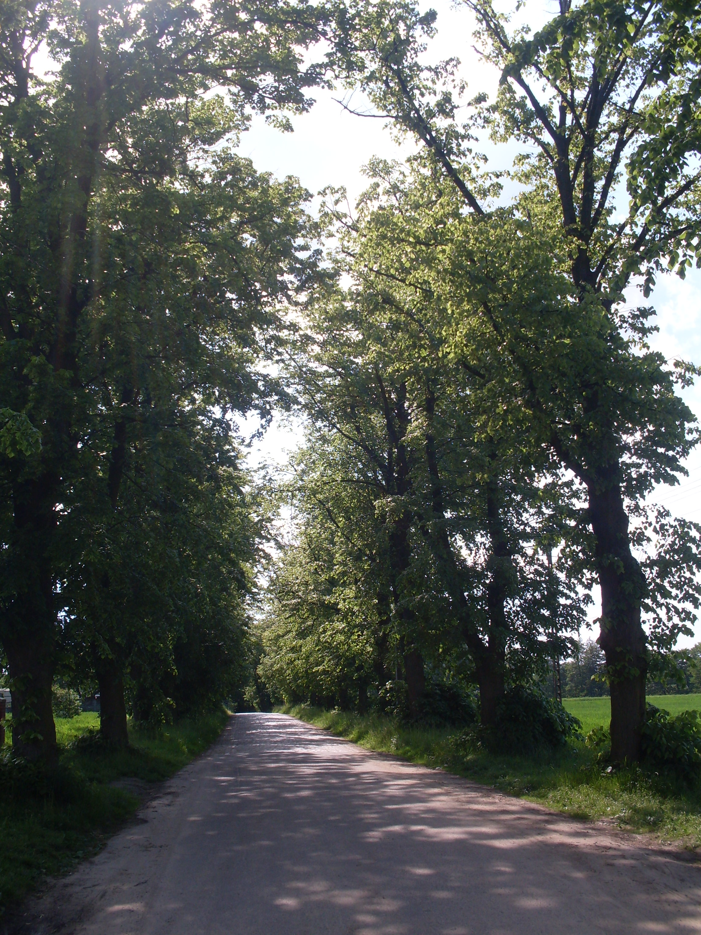 Lipy przy ul. Kościelnej w Przęsocinie koło Polic